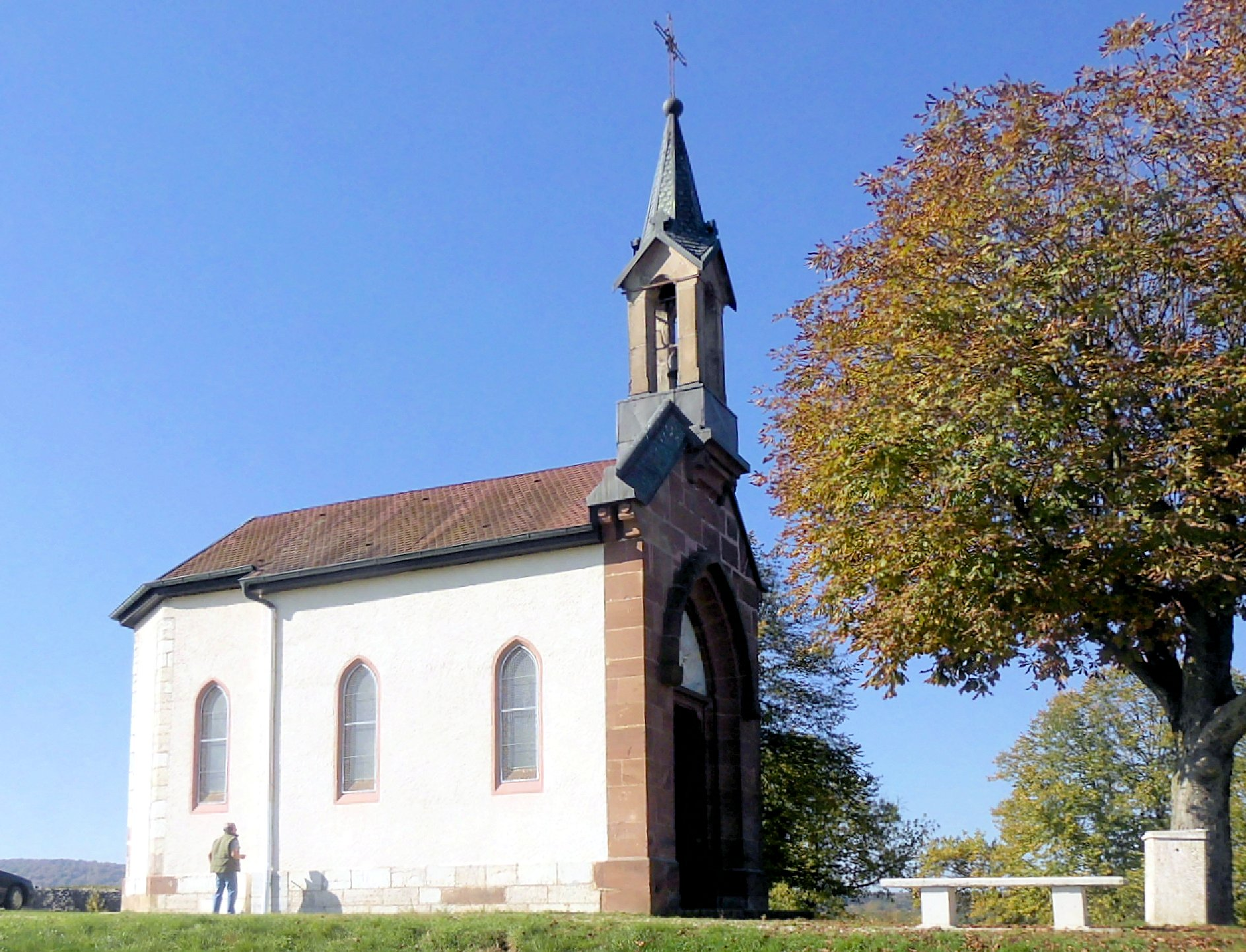 La chapelle_Notre-Dame de Bonsecours à Mandeure, côté nord-est